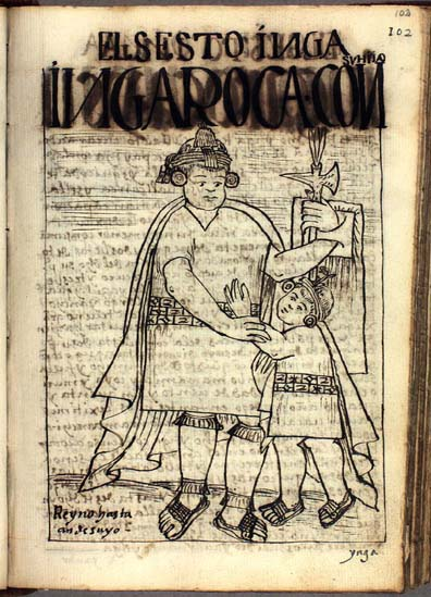 Hp_inka6.jpg